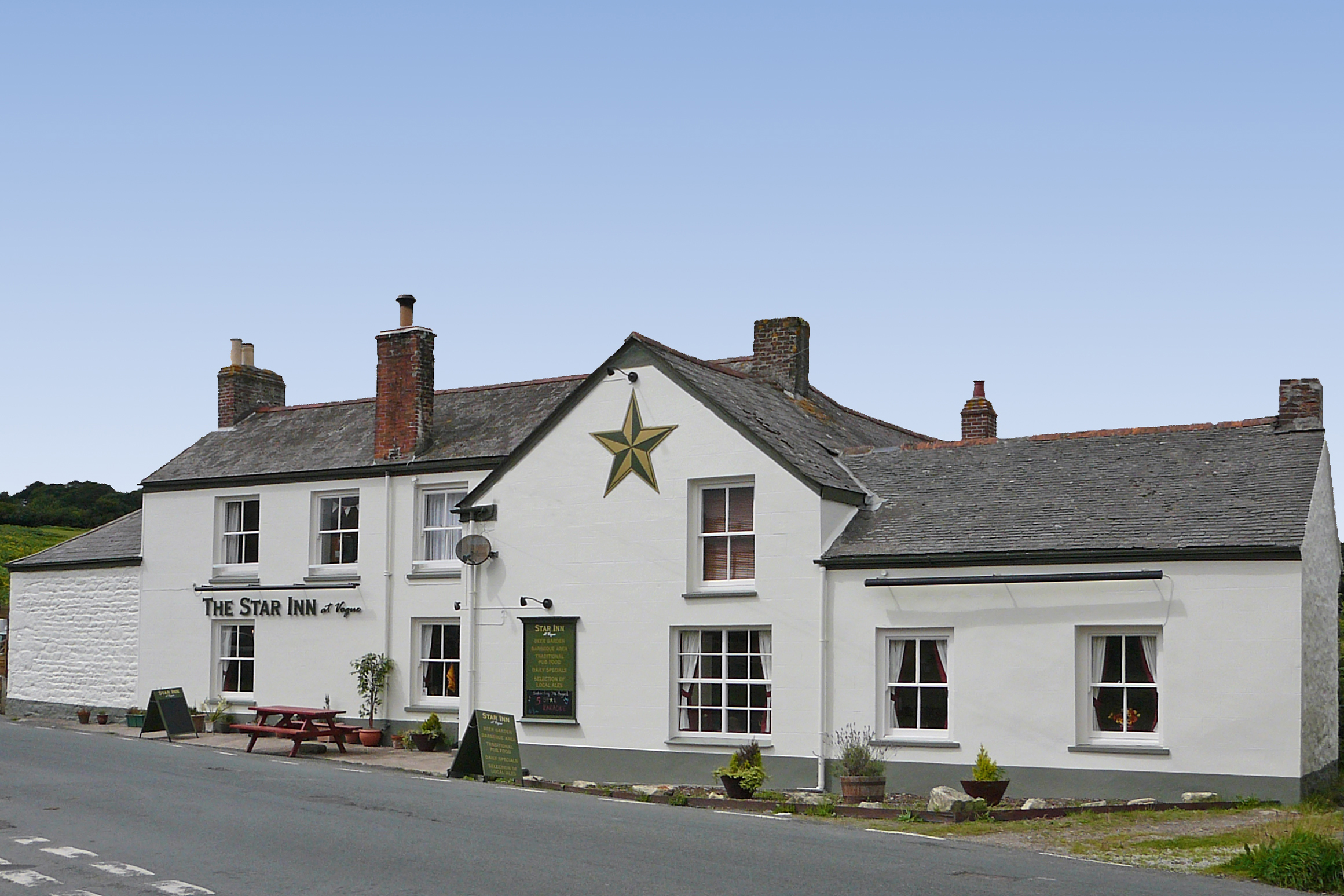 Star Inn, Vogue